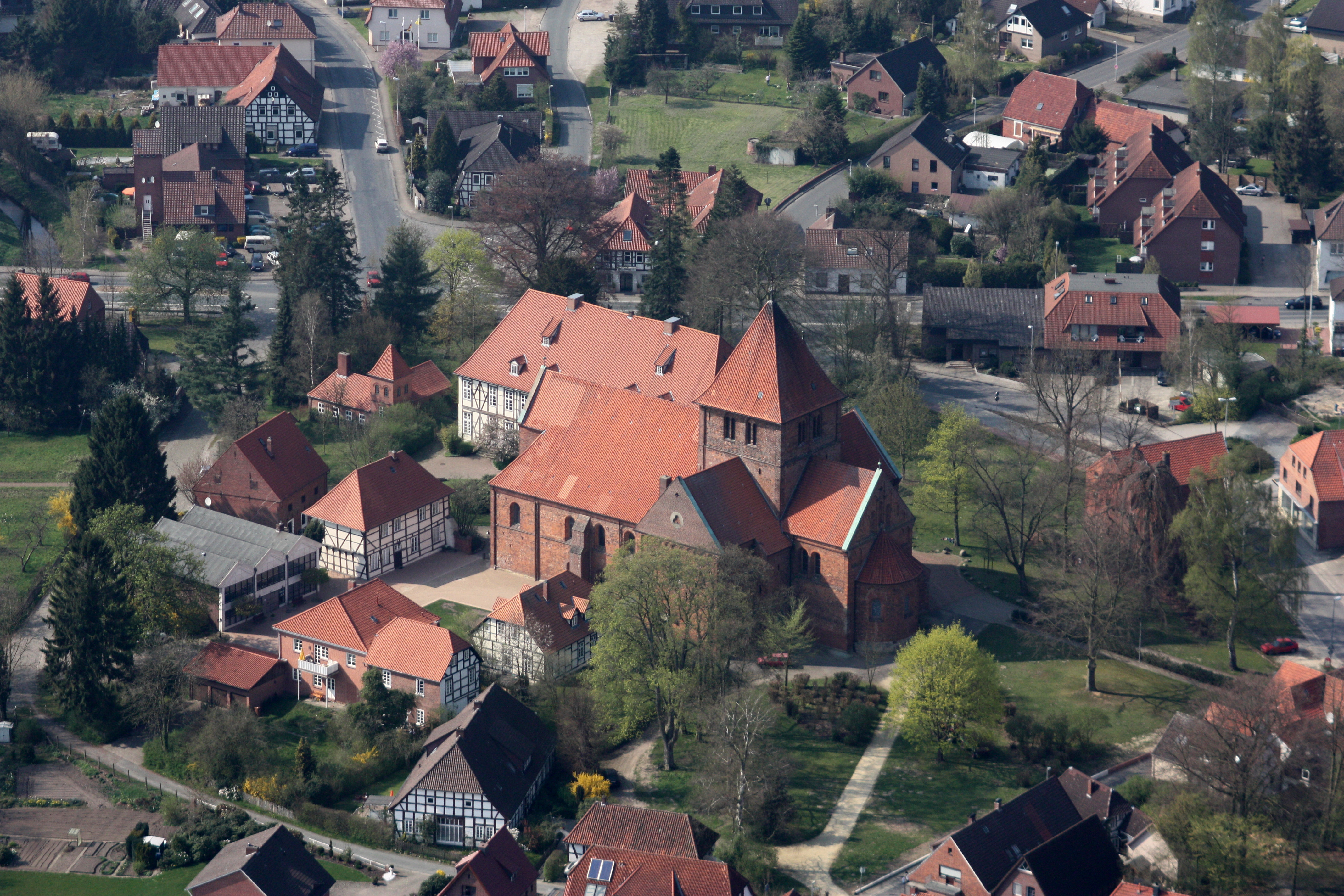 Luftbilde von Bassum